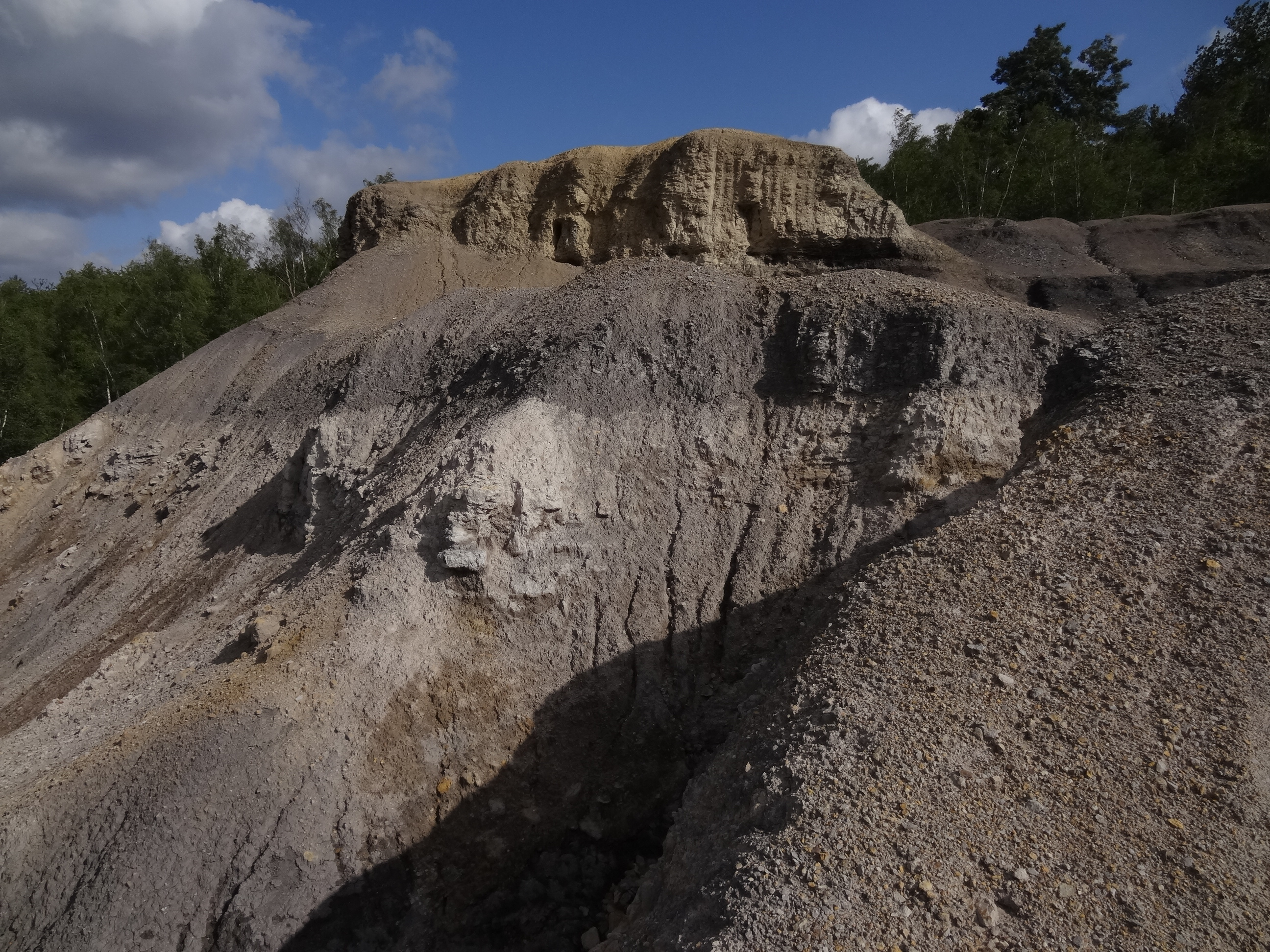 PP Cihelna v Bažantnici v Praze-Hloubětíně